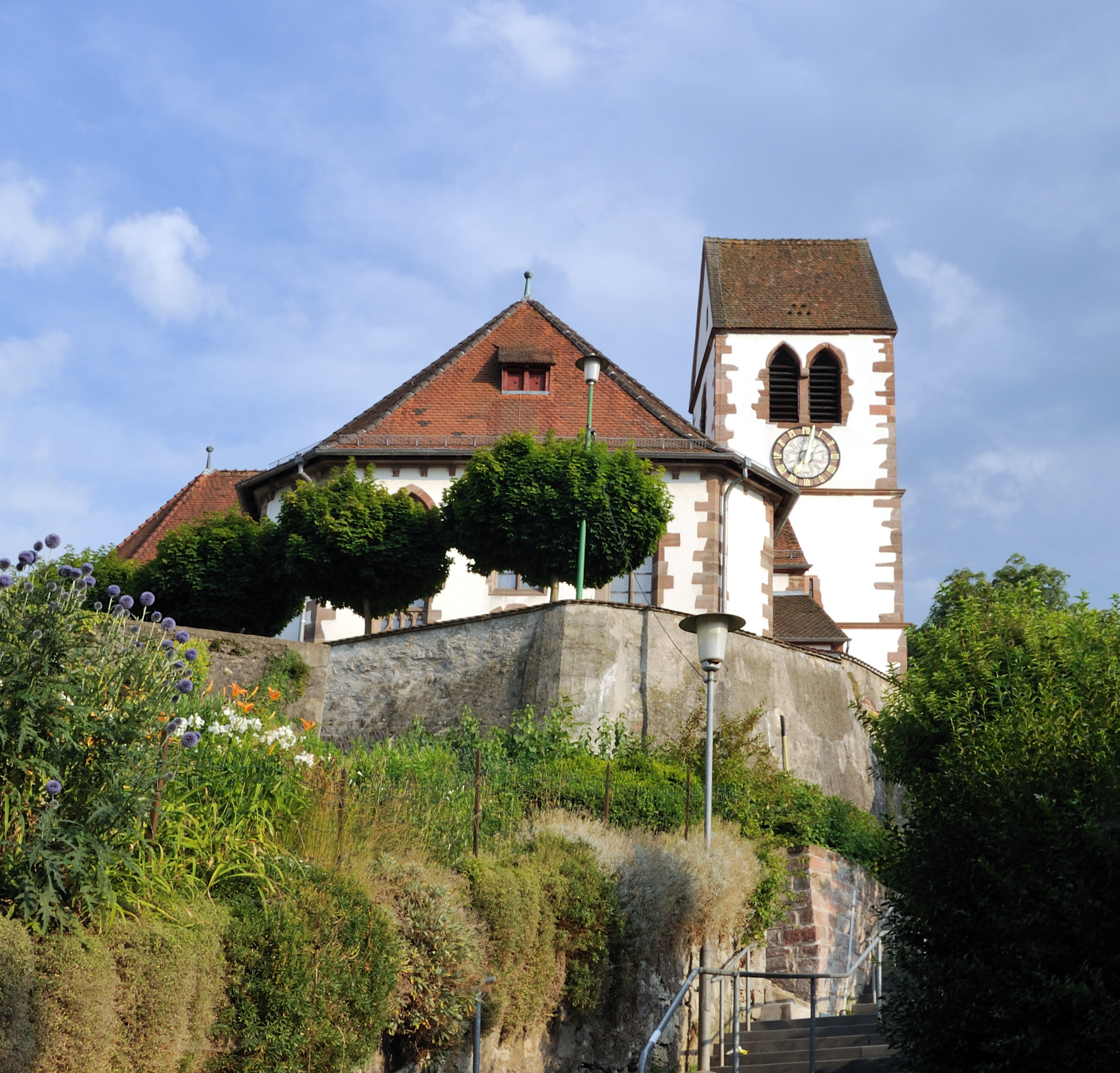 Lörrach-Brombach: Germanus-Kirche